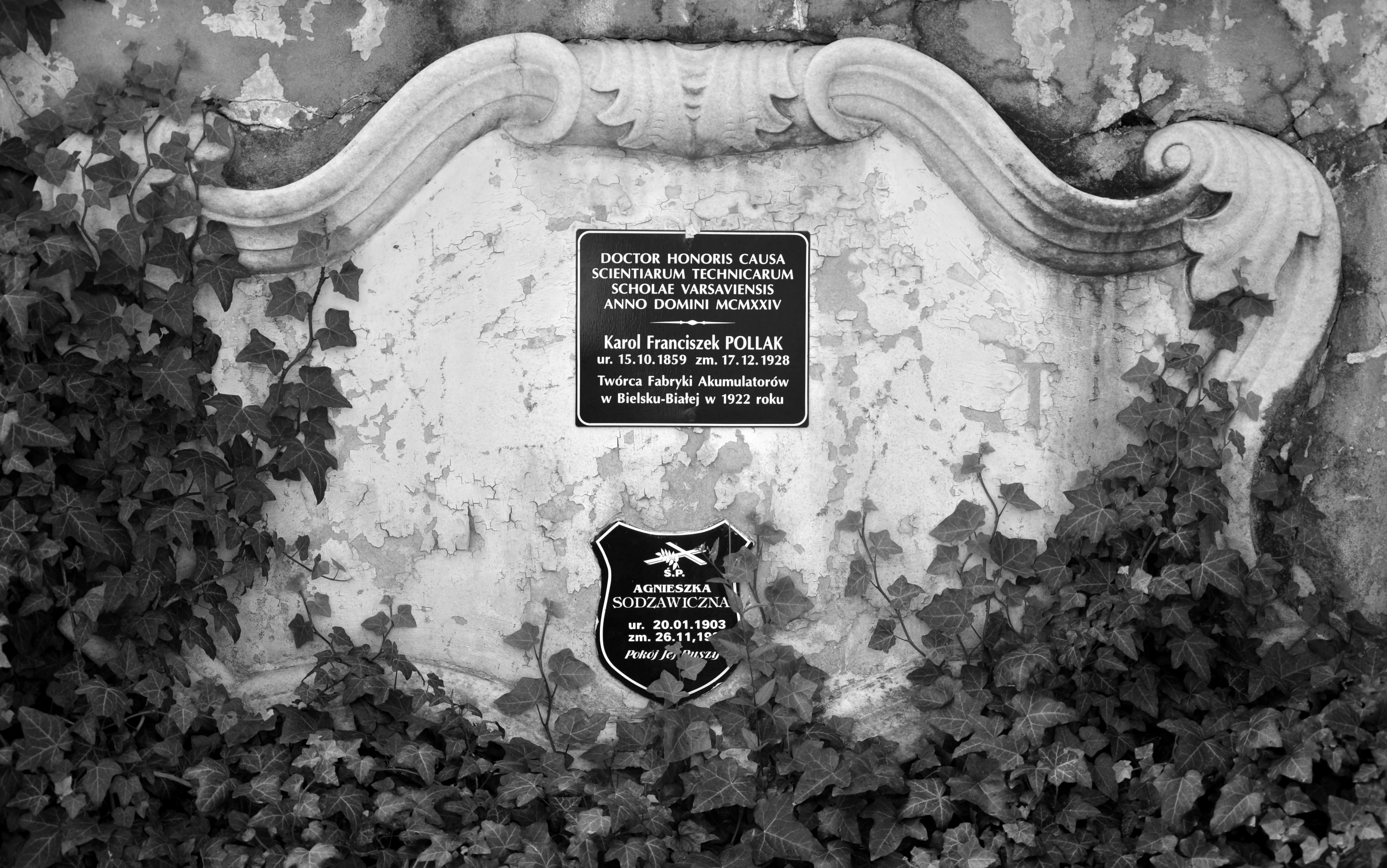 Katholischer Friedhof in Biała